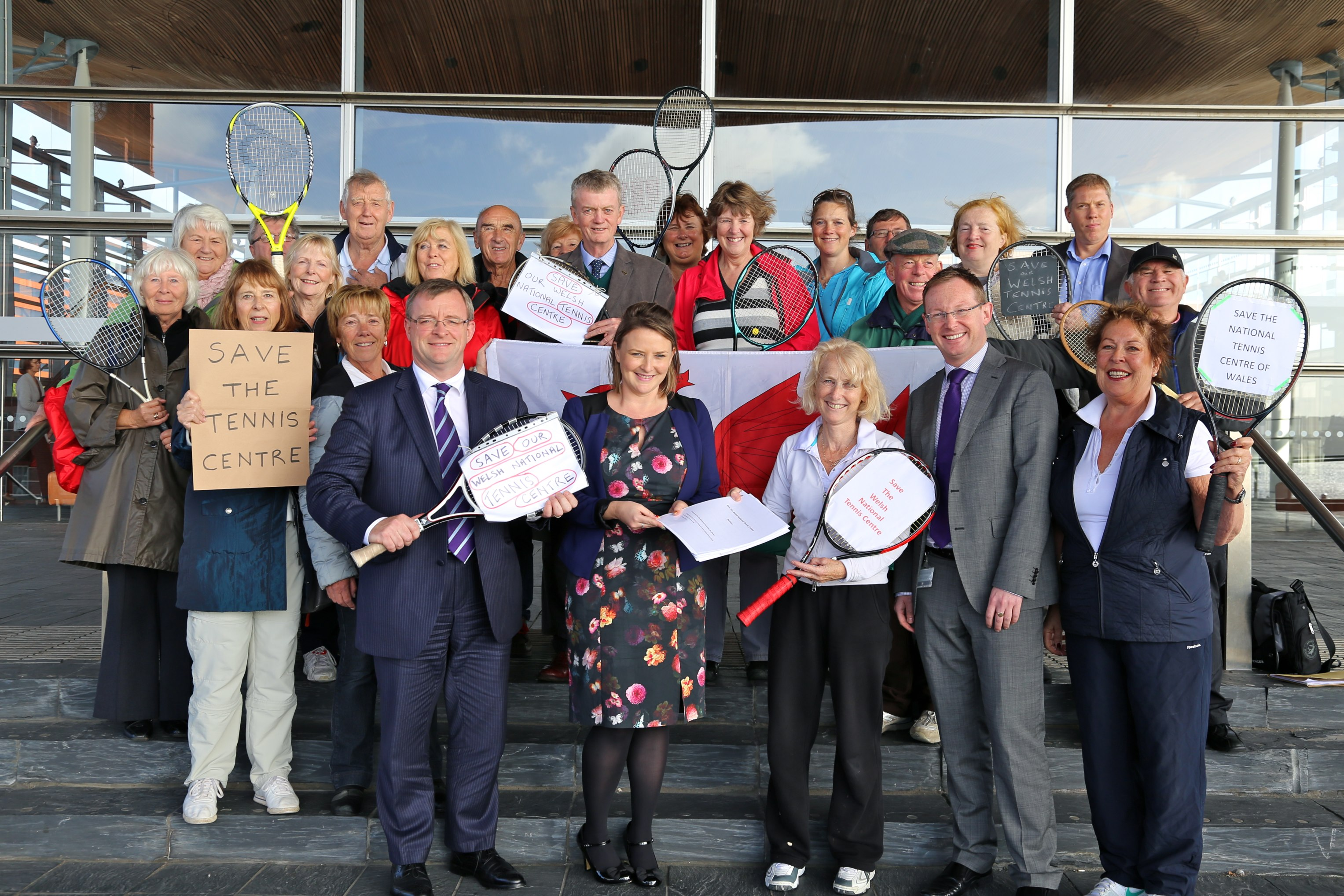 More information on the National Assembly’s Petitions system: Am fwy o wybodaeth ar system deisebau Cynulliad Cenedlaethol Cymru